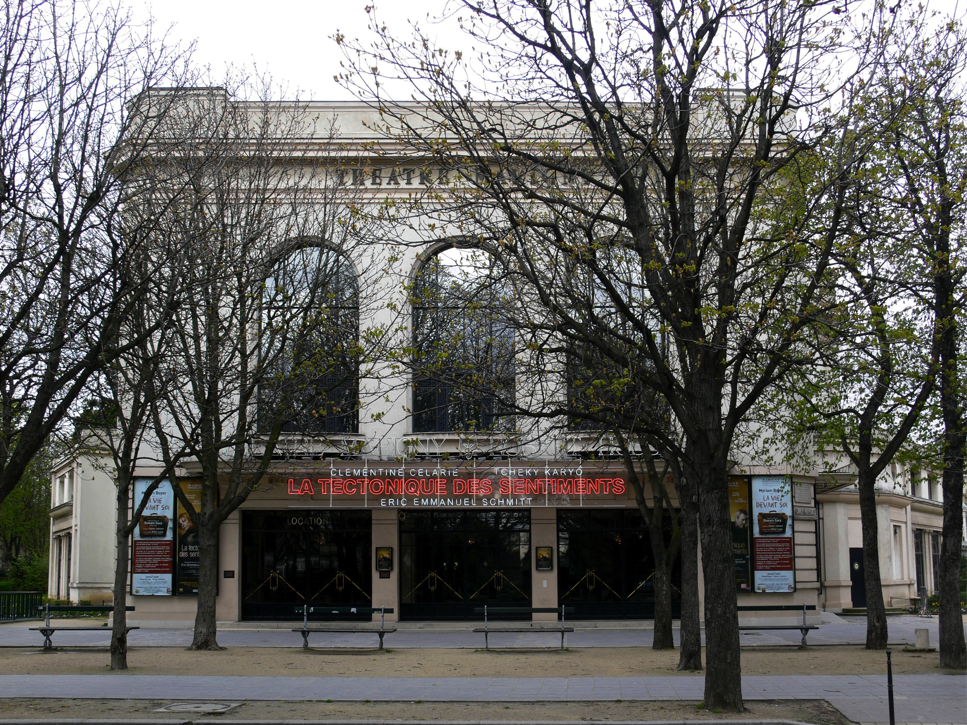 Théâtre Marigny, Avenue des Champs-Élysées, Paris (vu de l'avenue Marigny)